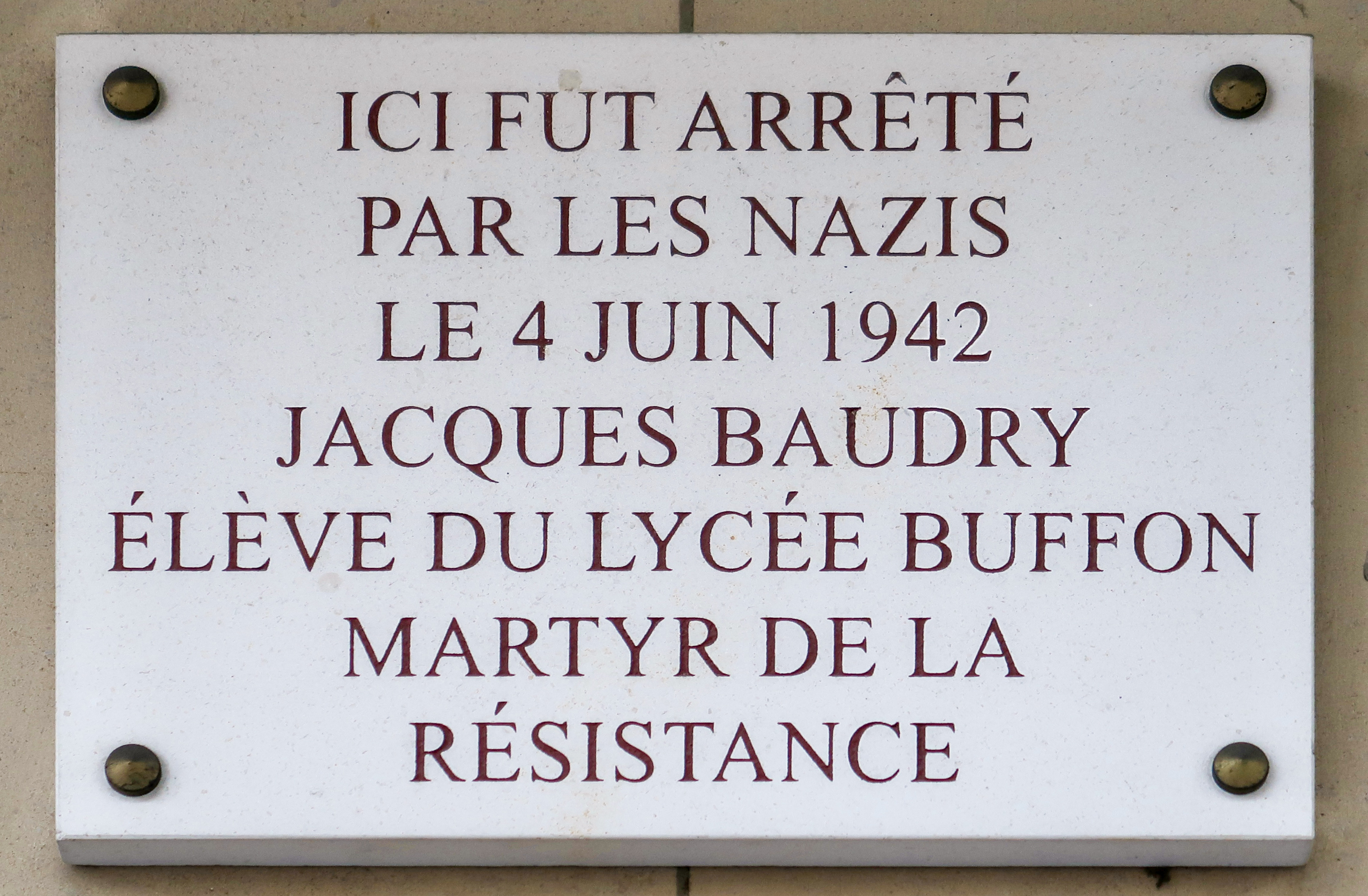 Plaque en hommage à Jacques Baudry (un des martyrs du lycée Buffon), arrêté par les Nazis en 1942, 247 rue de Vaugirard (Paris, 15e).